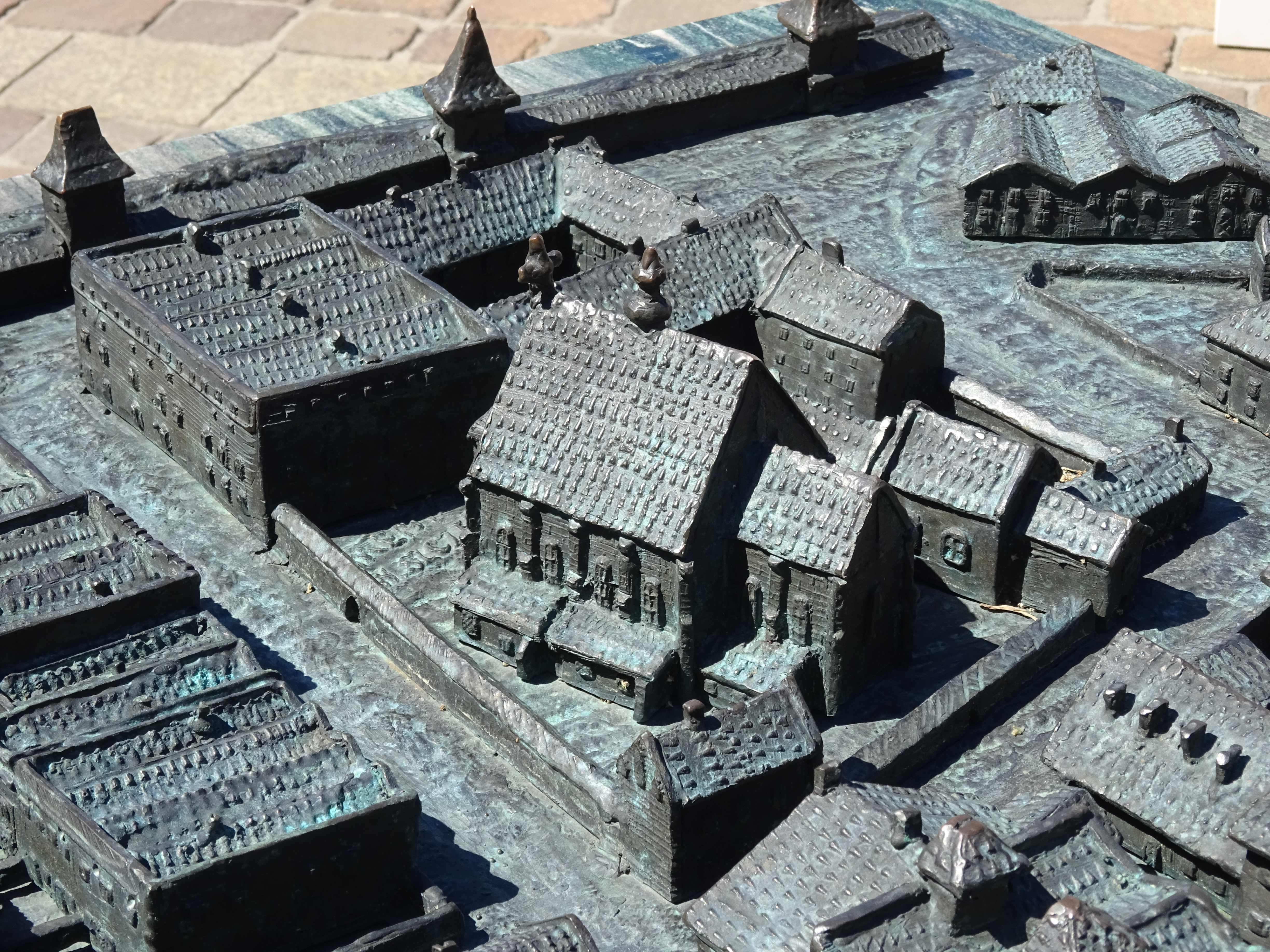 Model nieistniejącego Kościoła św. Szczepana w Krakowie wraz z pobliskimi zabudowaniami. Plac Szczepański. 2017